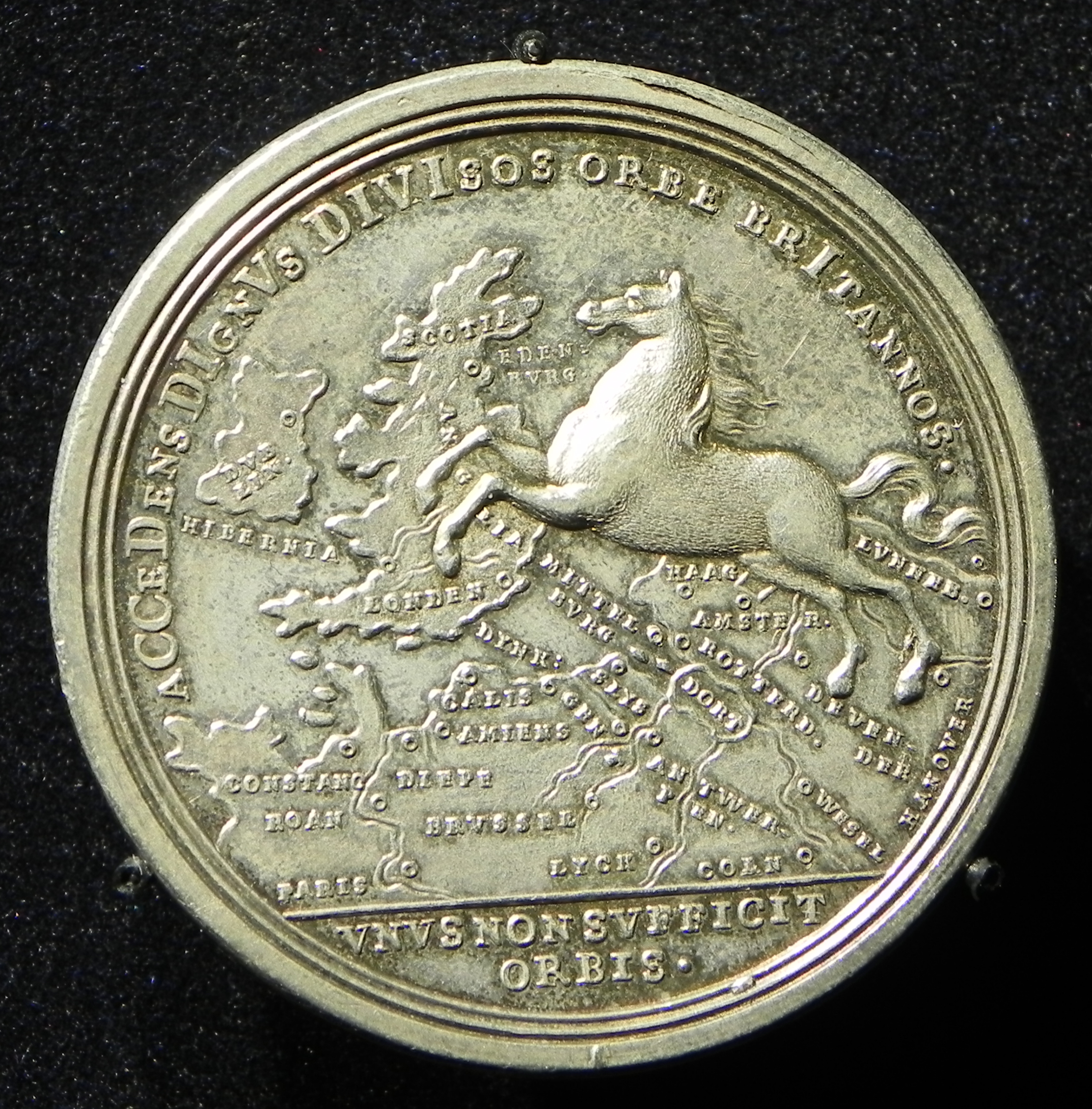 Medaille auf den Regierungsantritt des Kurfürsten Georg Ludwig von Hannover als König Georg I. von Großbritannien und Irland. Ein Teil der Umschrift lautet: „Unus non sufficit orbis“ (Eine Welt allein ist nicht genug)